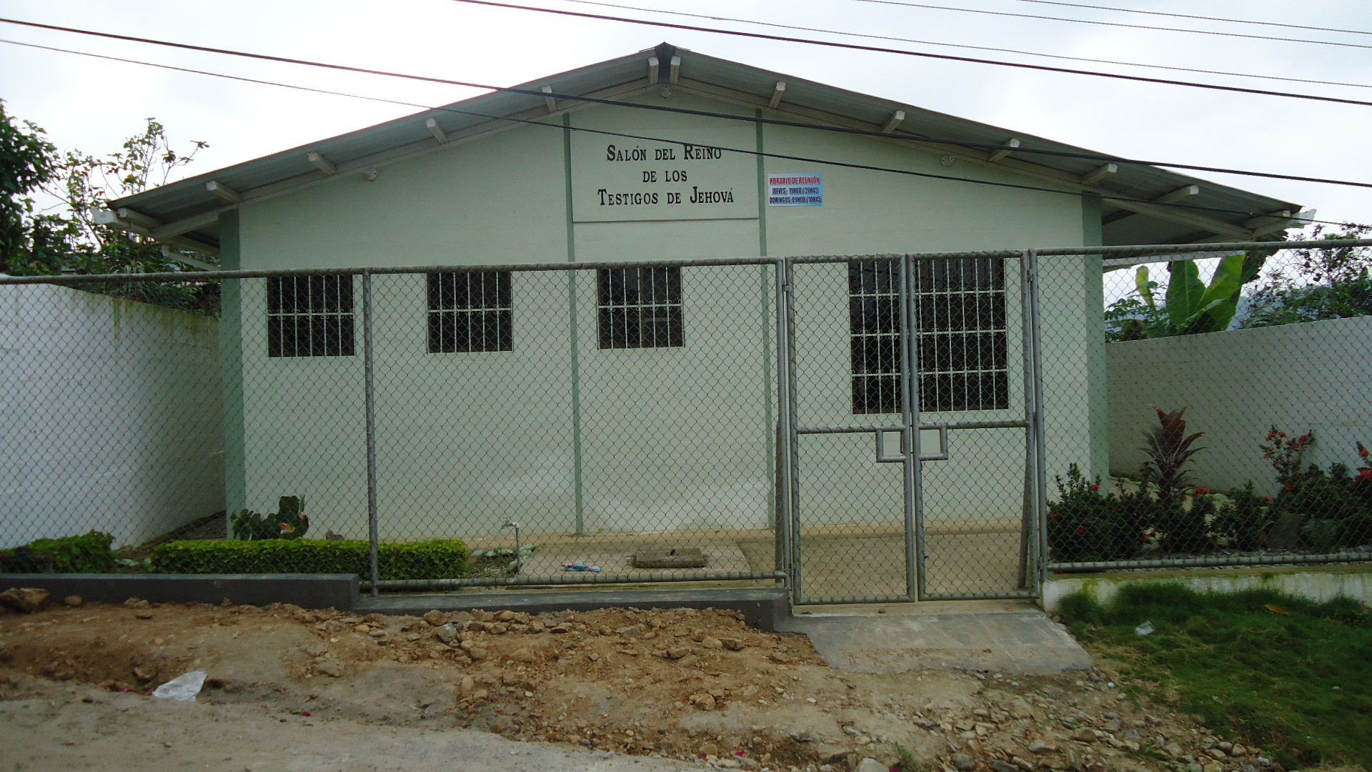 Salón del Reino de los Testigos de Jehová